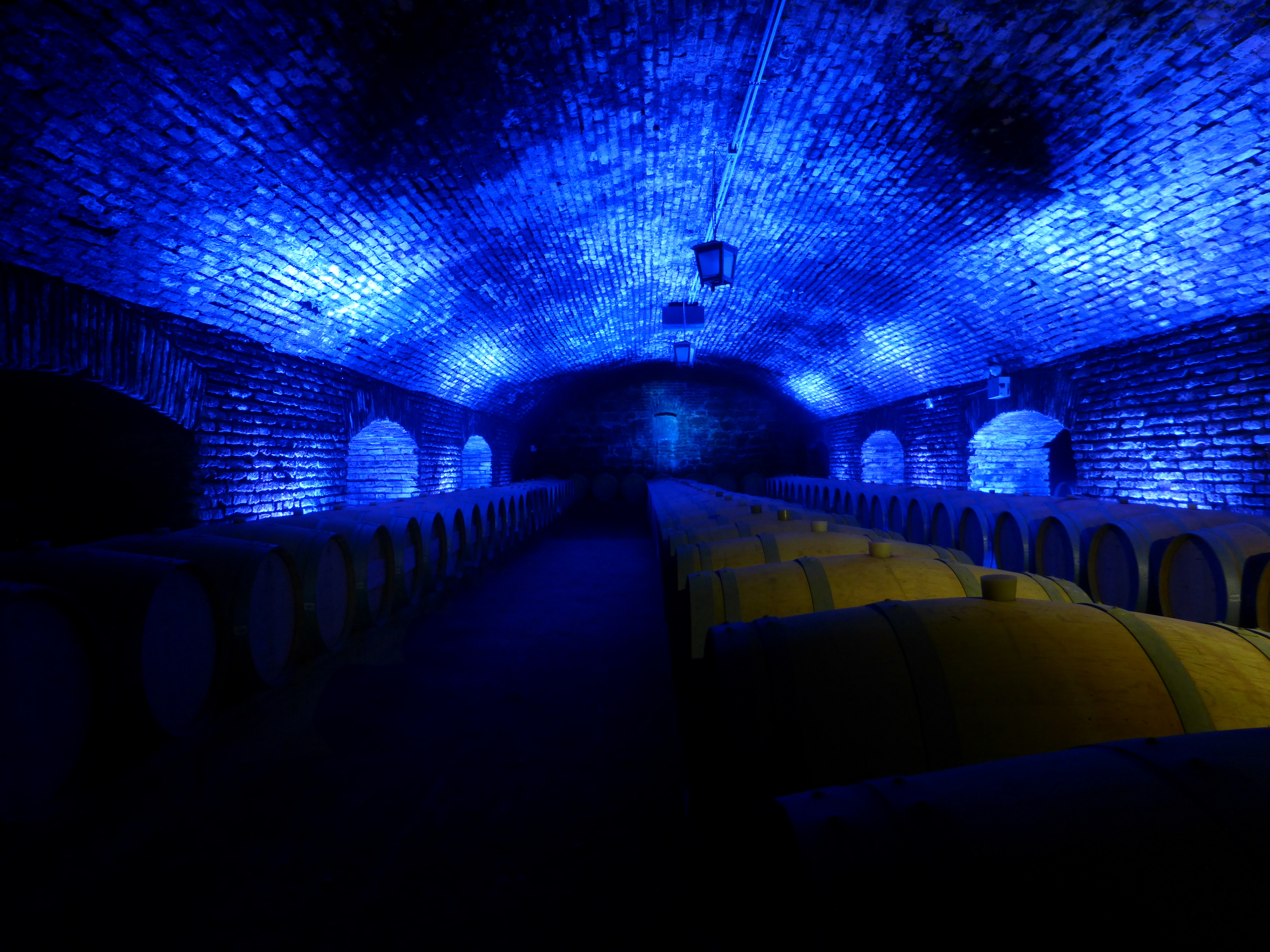 Vista interior del Casillero del diablo en la bodega Concha y Toro ubicada en Pirque, Chile.